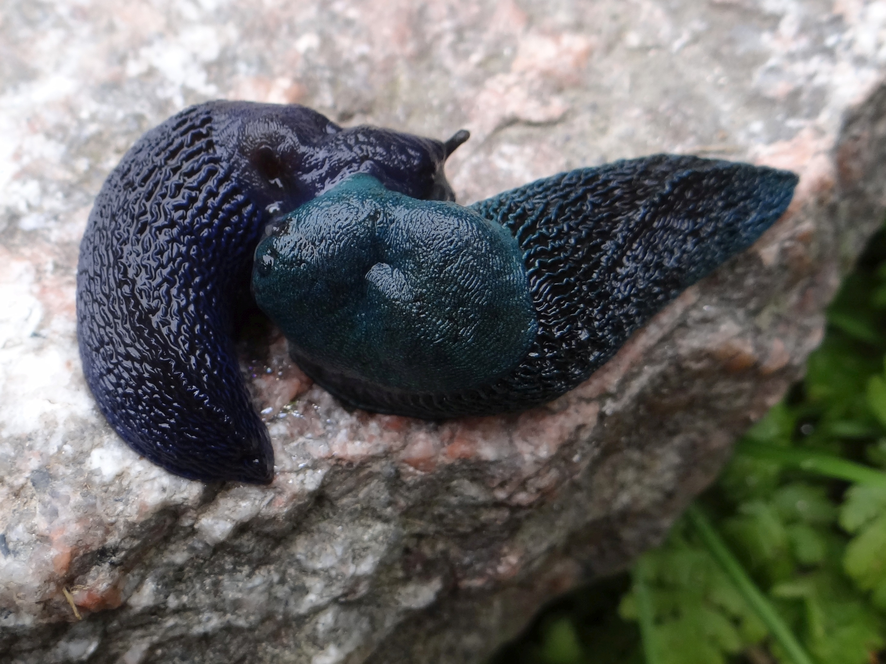 Bielzia coerulans (location: Poland, Tatra Mountains, północne stoki Kasprowego Wierchu, ok. 1600 m n.p.m.)